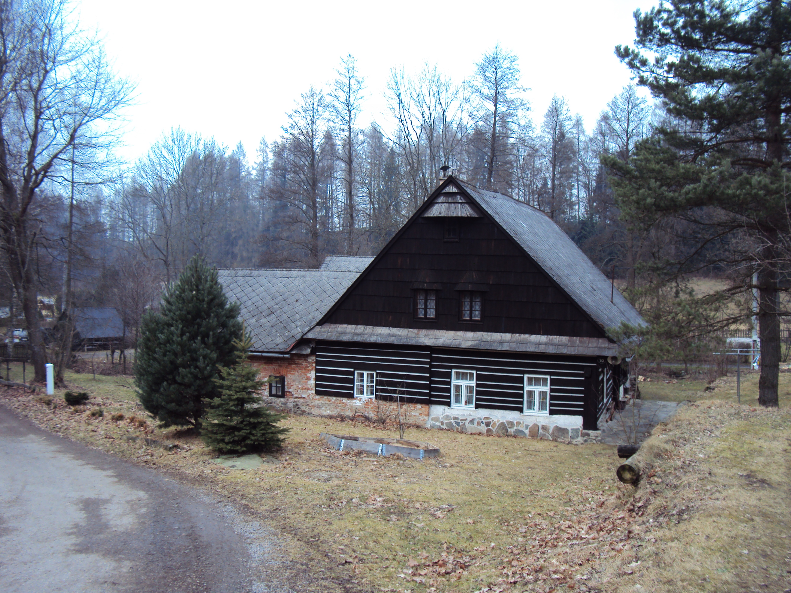 Chalupa Dolní Heřmanice01